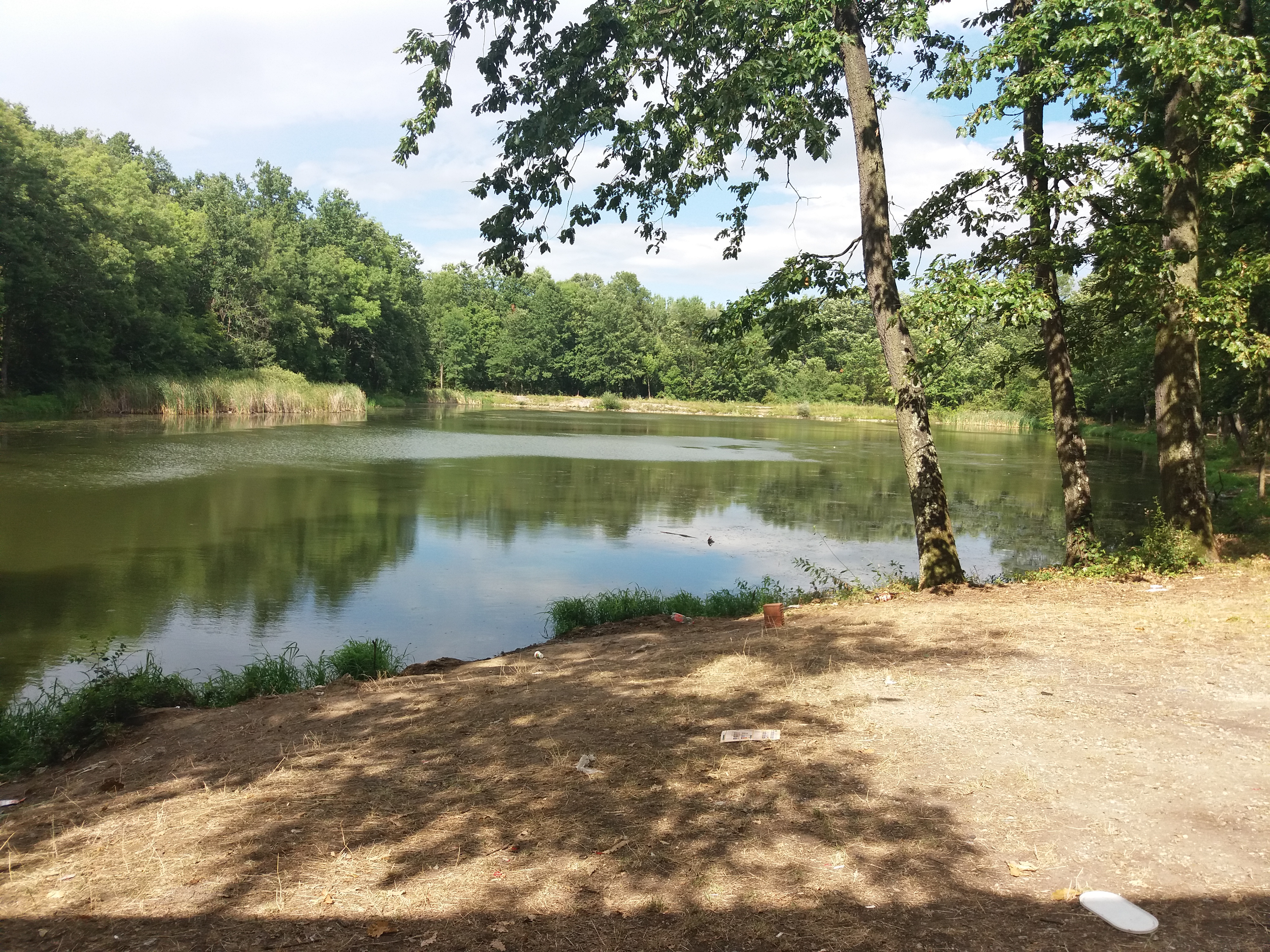 Srpski (latinica): Manastir Pinosava, Kusadak